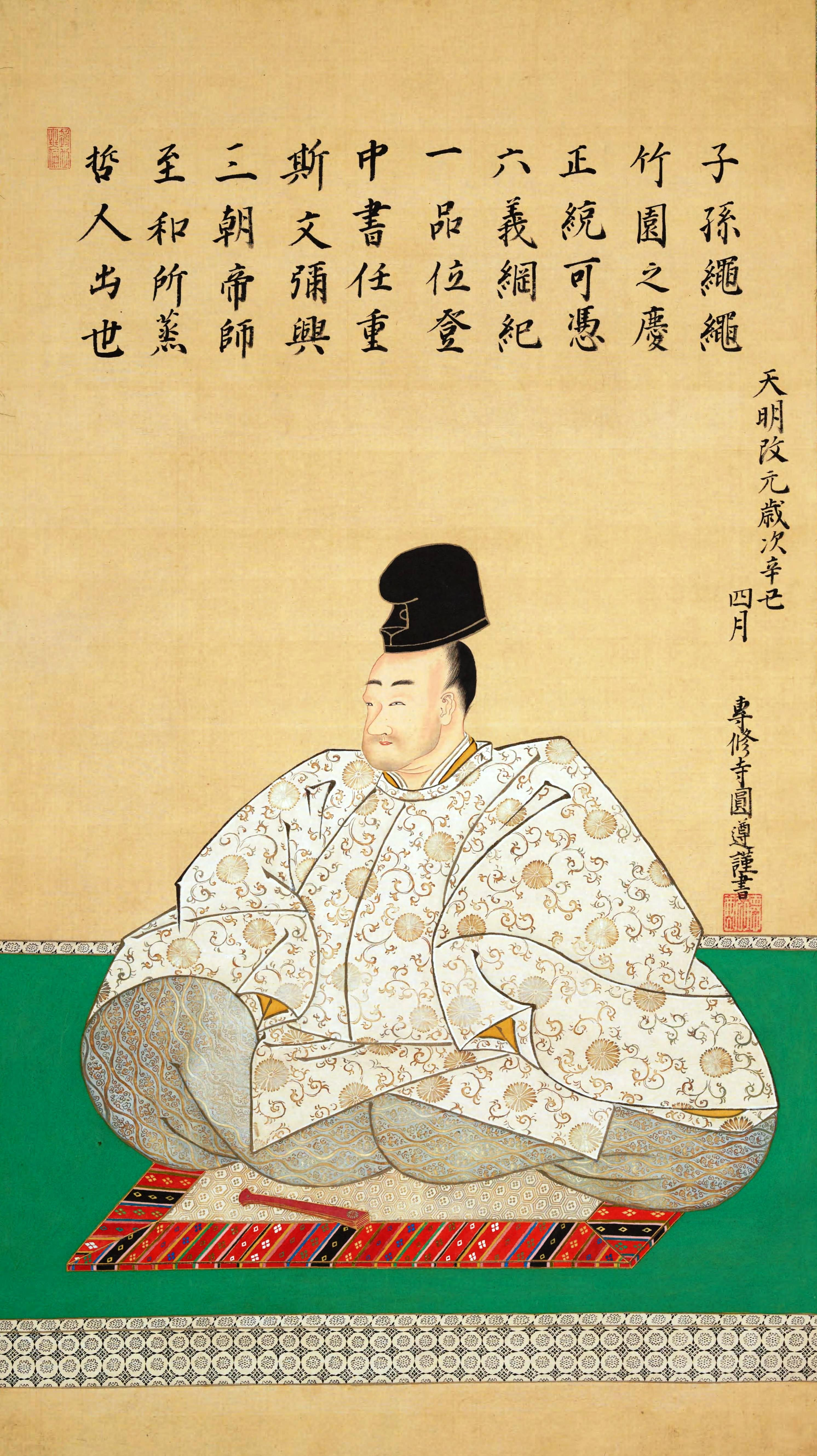 有栖川宮職仁親王の肖像。